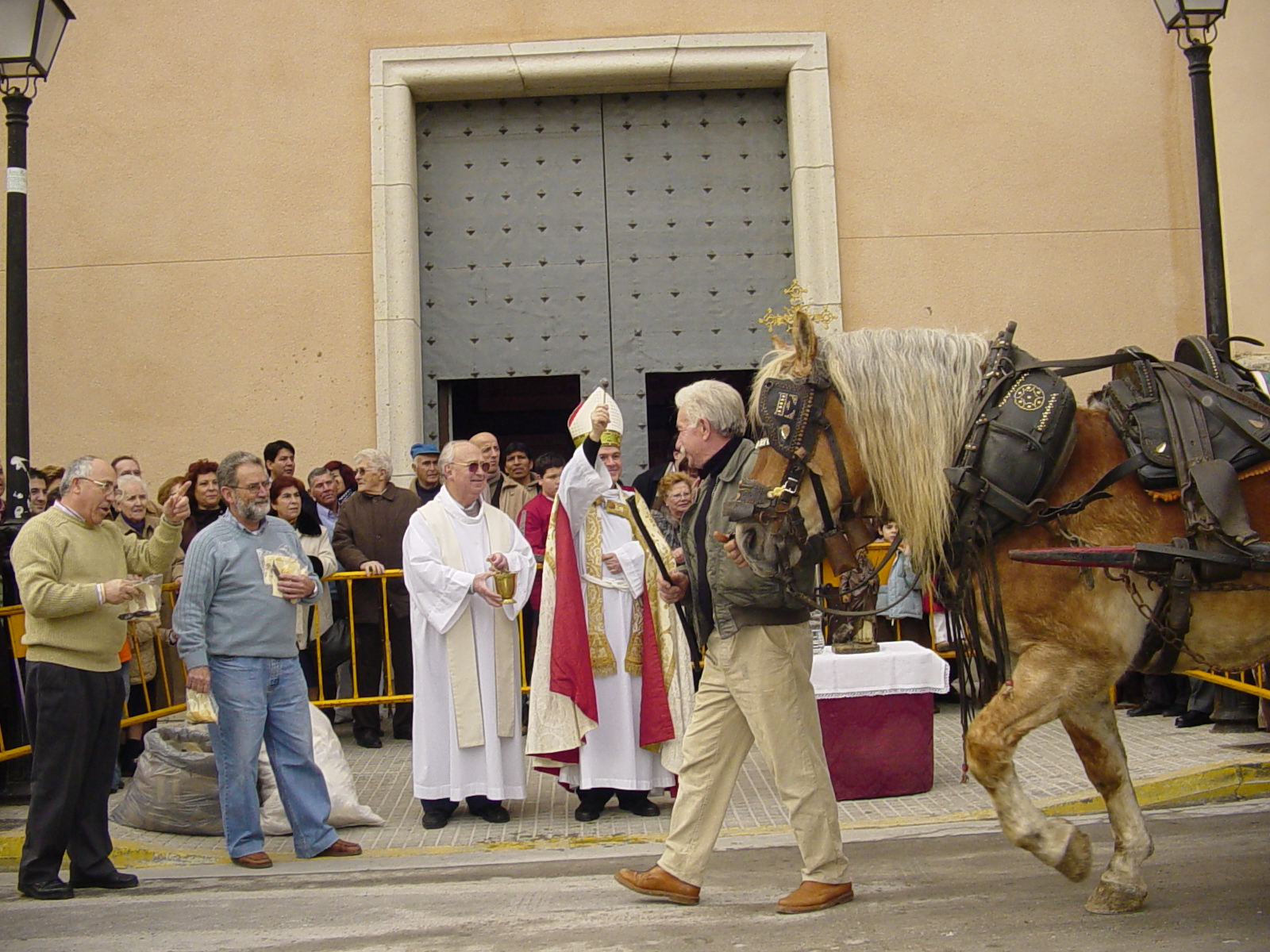 Vista de la benedicció d'animals a la festa de Sant antoni de Beniopa